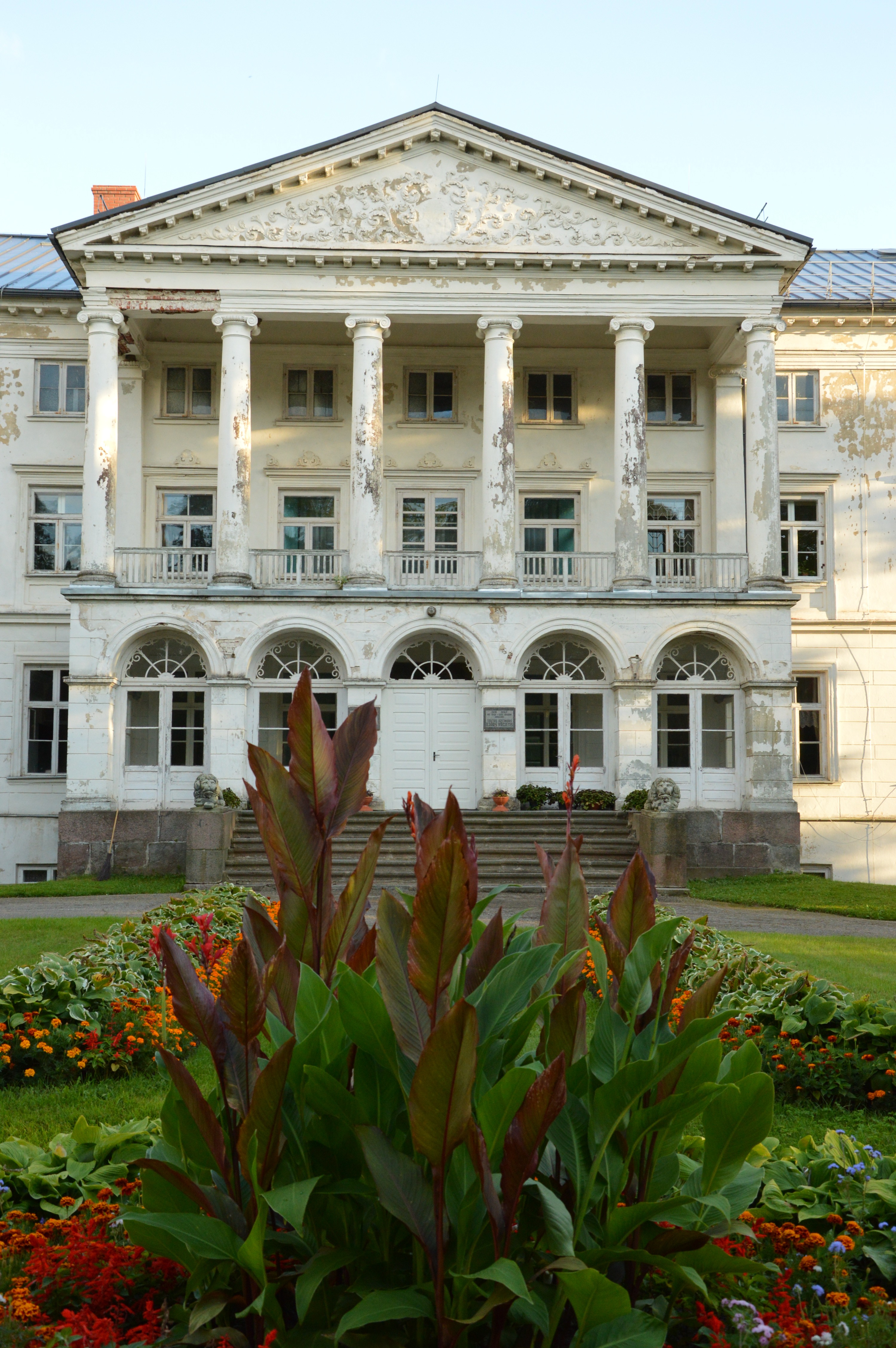 Koivaliina Uus loss